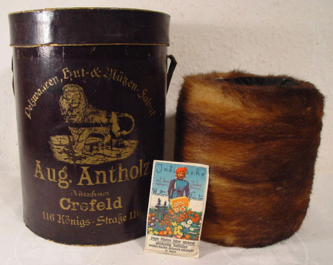 Muffschachtel (ca. um 1900) des Kürschners Aug. Antholz, Krefeld, Königs-Straße 116, Pelzwaaren-, Hut und Mützen-Fabrik. heute noch beinhaltend, offensichtlich aus der Zeit, einen Muff aus Iltisfellen (Nerzfellen?) sowie eine Tüte mit Indische Motten-Kräuter gegen Motten sicher wirkend gleichzeitig Duftkissen, zwischen Kleider, Pelzwerk und Wäsche zu legen.